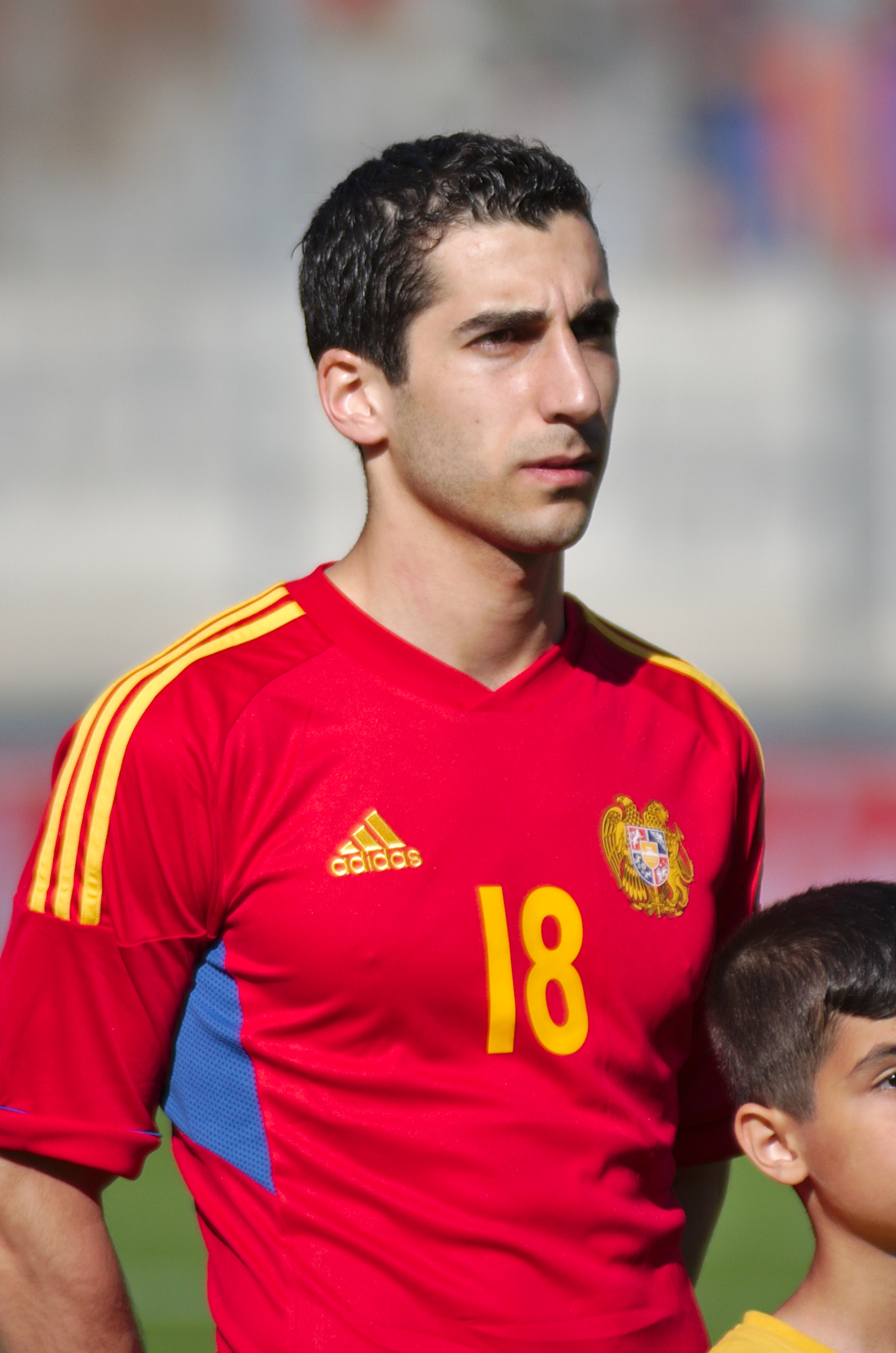 Algérie - Arménie - 20140531 - Henrikh Mkhitaryan